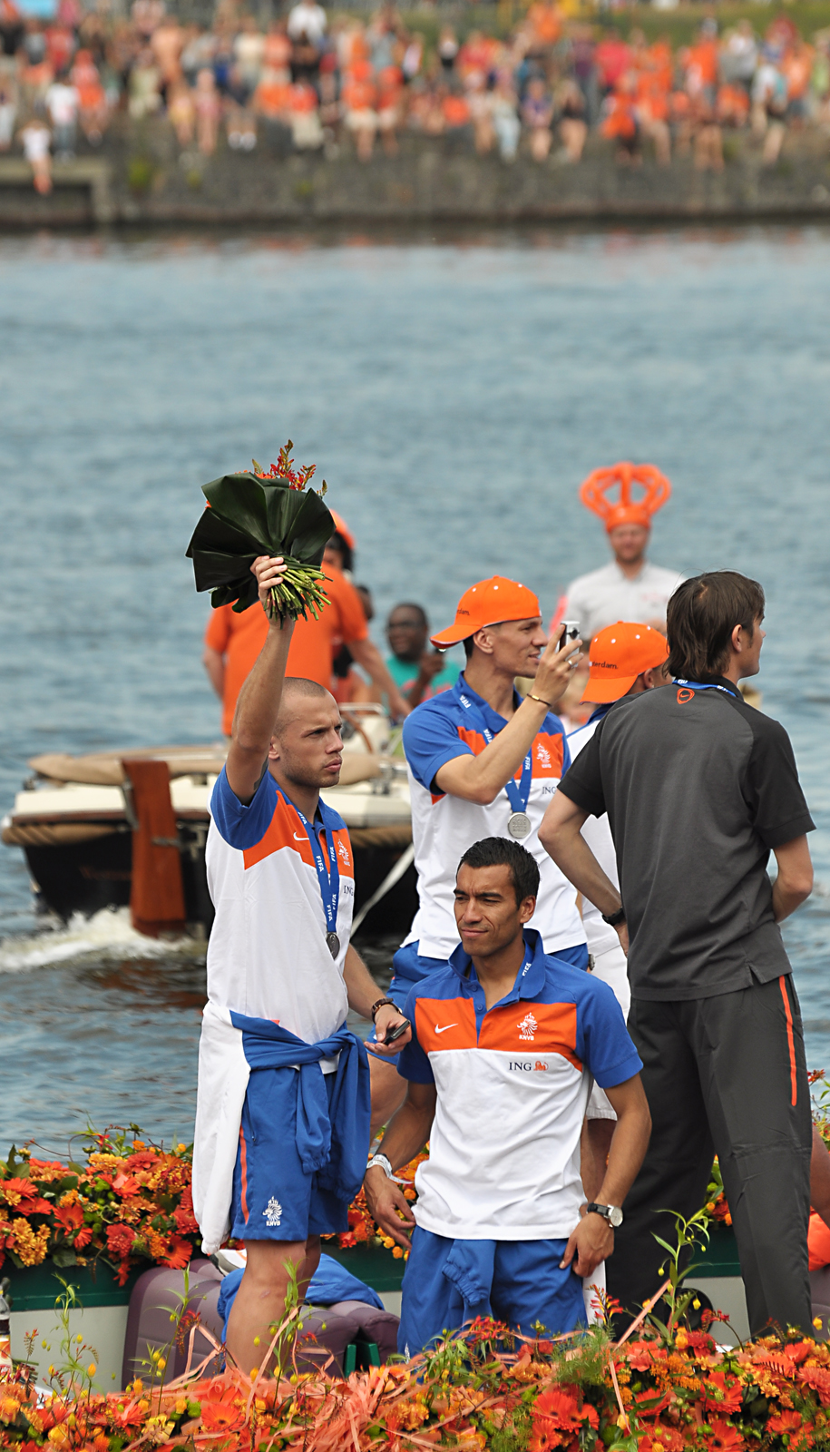 John Heitinga, Khalid Boulahrouz, Giovanni van Bronckhorst